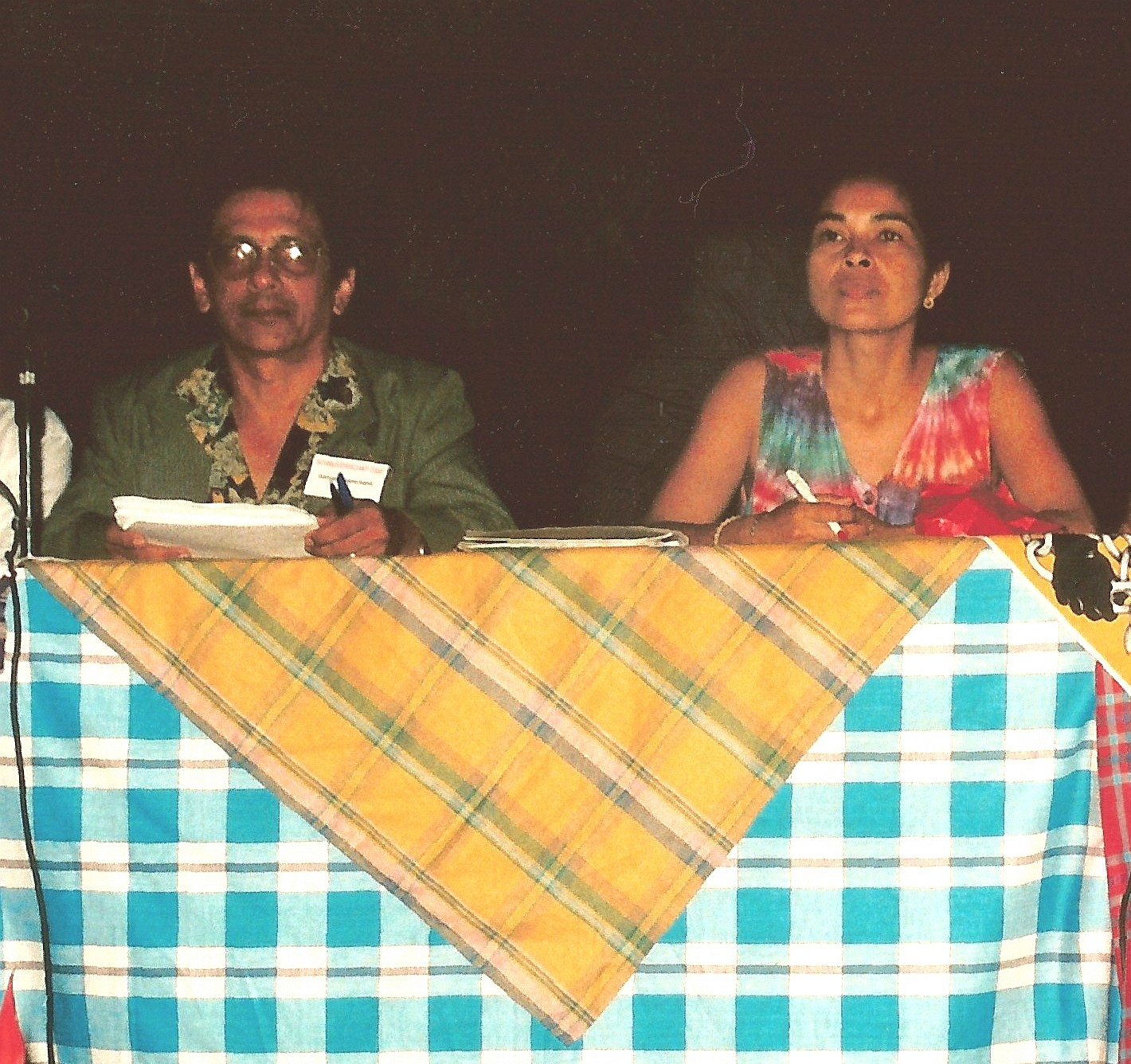 Criticus Kenneth Ramchand en Surinaams schrijfster Ismene Krishnadath op het congres Schrijverschap 2000, nationaal of internationaal? in Paramaribo, in 1997. Eigen opname.